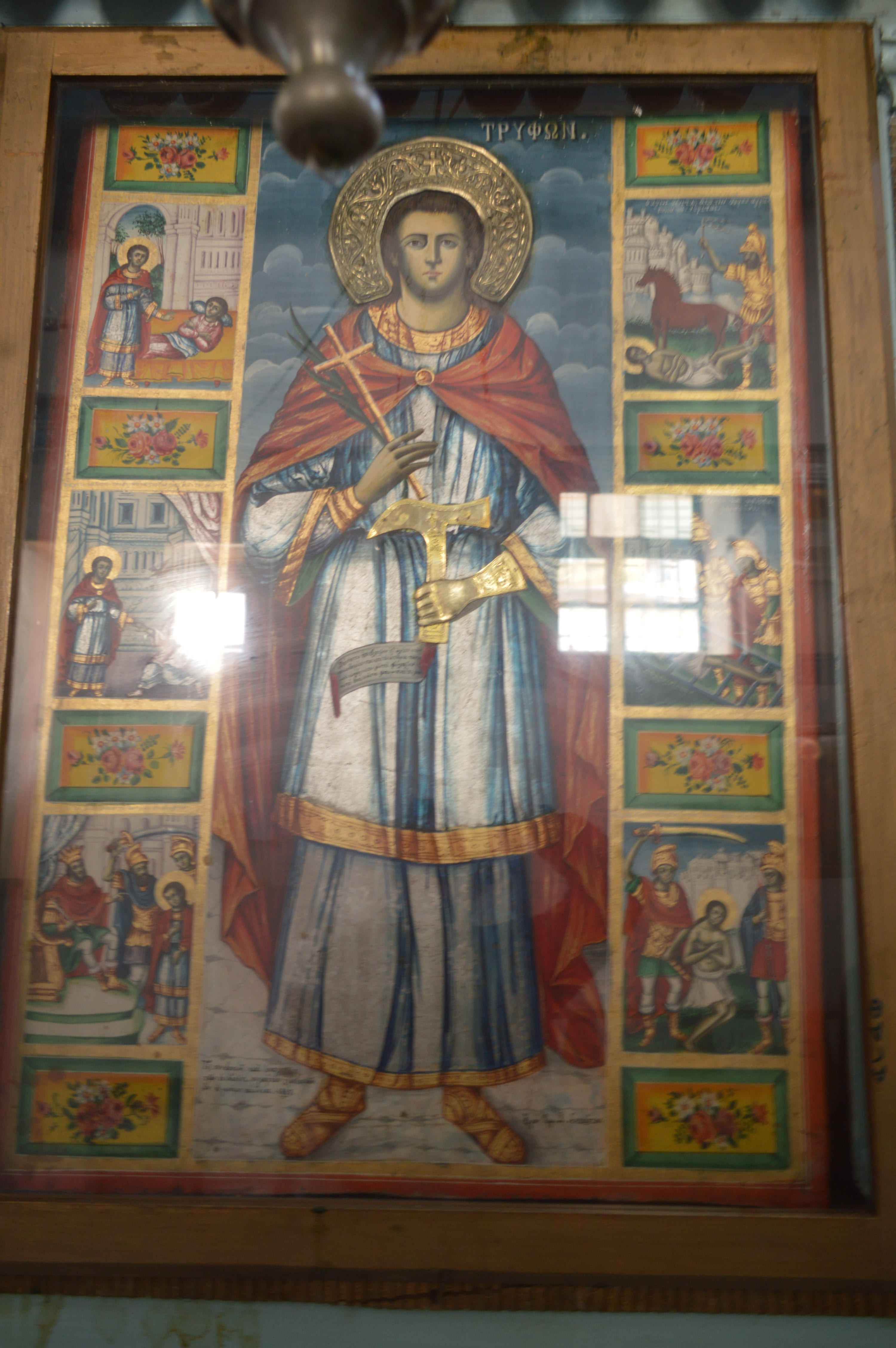 Εσωτερικό του Ναού (18)